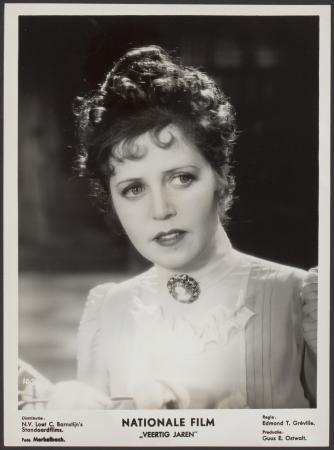 Lily Bouwmeester (1901-1993) op de poster van de vooroorlogse film Veertig jaren (1938).